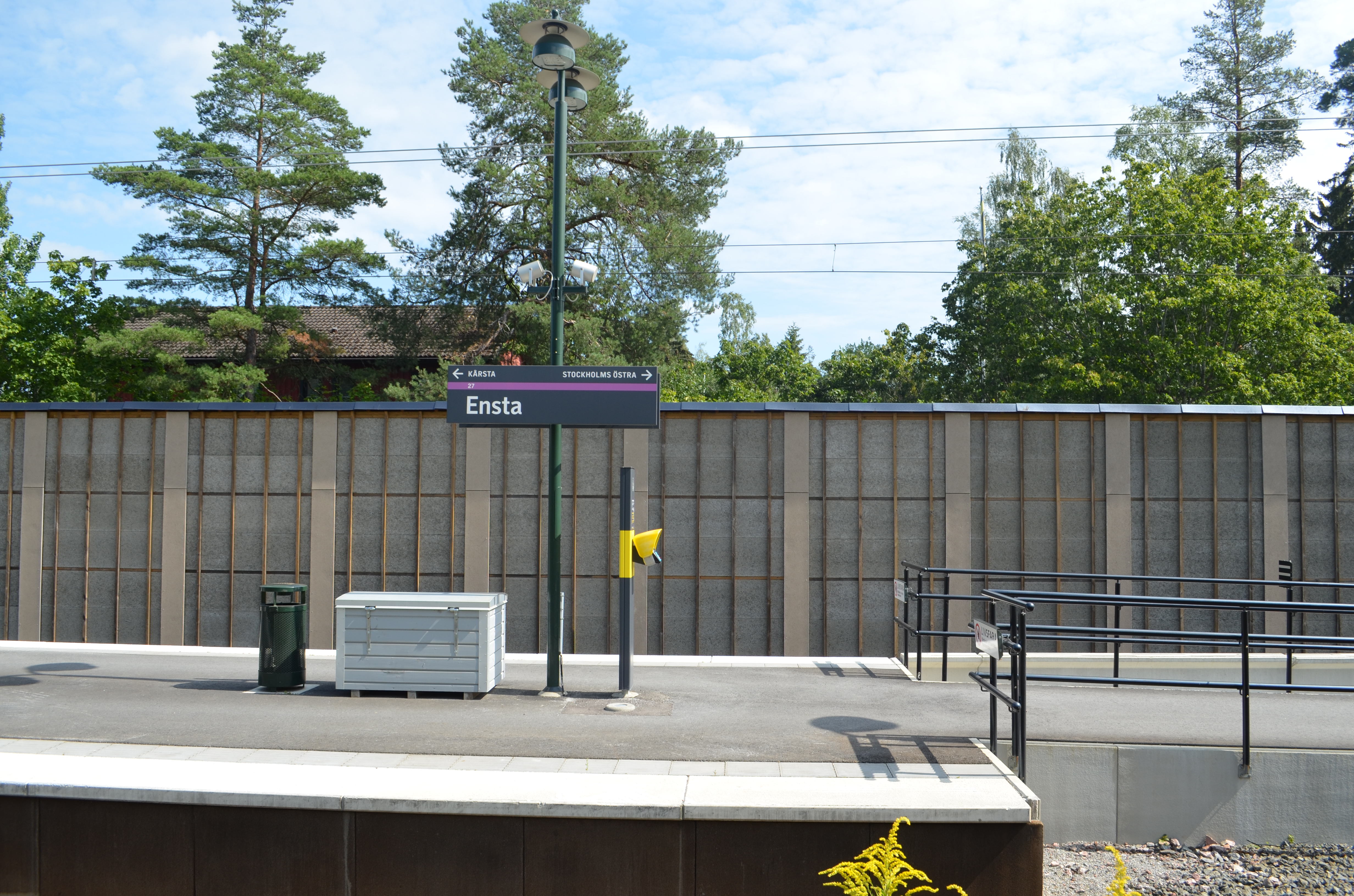 Ensta station